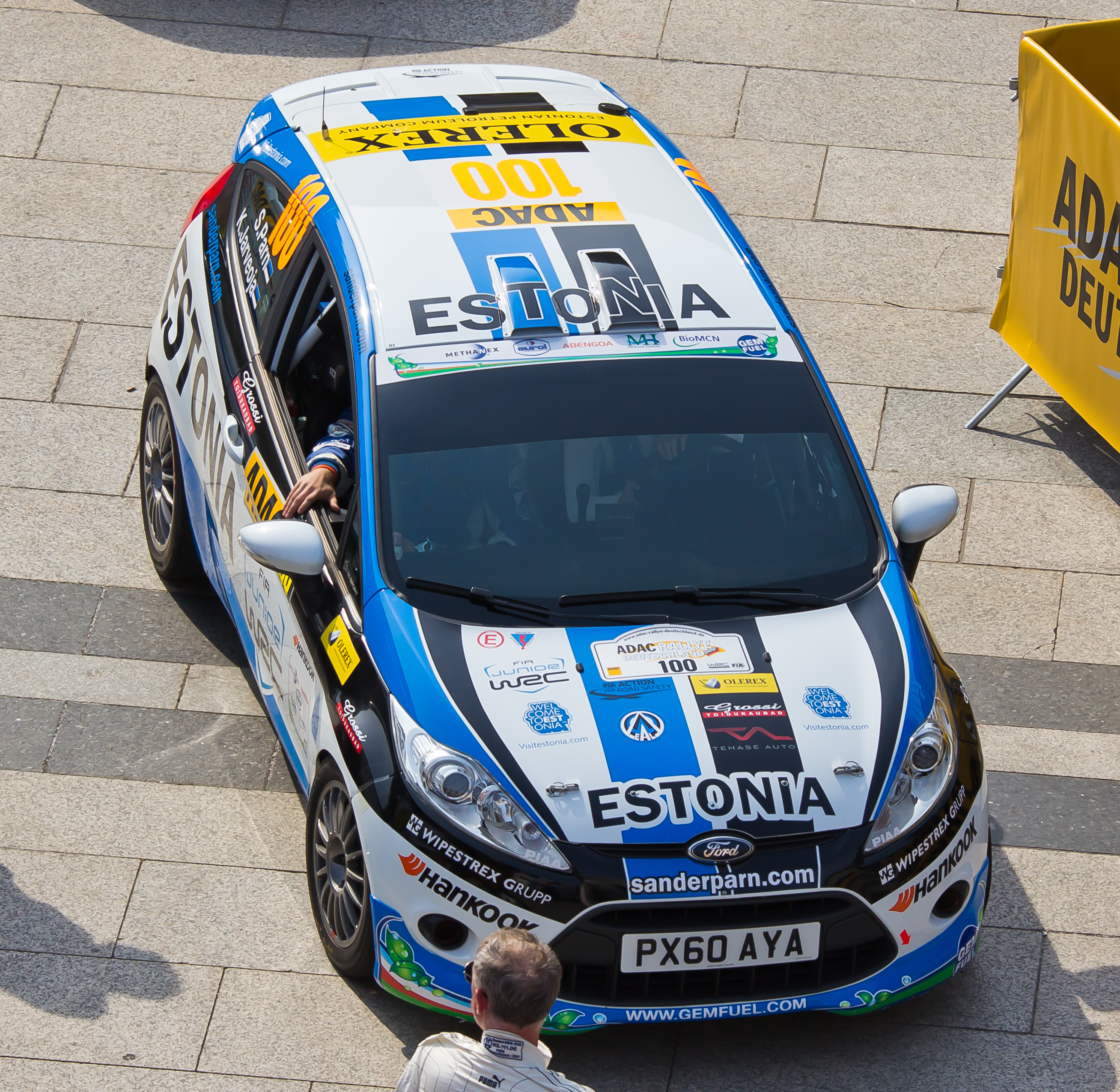 ADAC Rallye Deutschland 2013 - Fahrerpräsentation auf dem Roncalliplatz: Team Saintéloc Racing mit Fahrer Sander Pärn und Co-Fahrer Ken Järveoja im Ford Fiesta R2